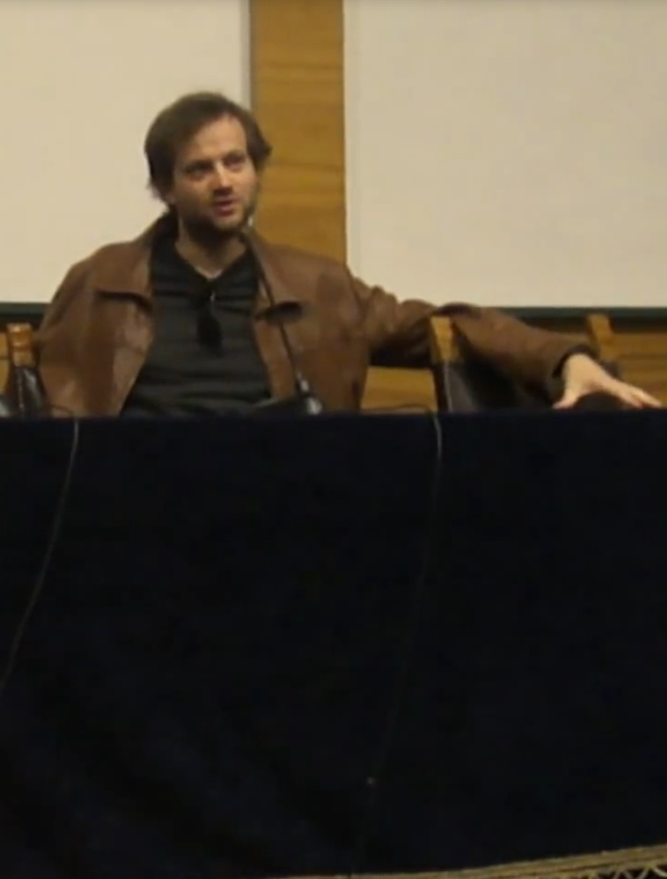 Axel Kaiser.